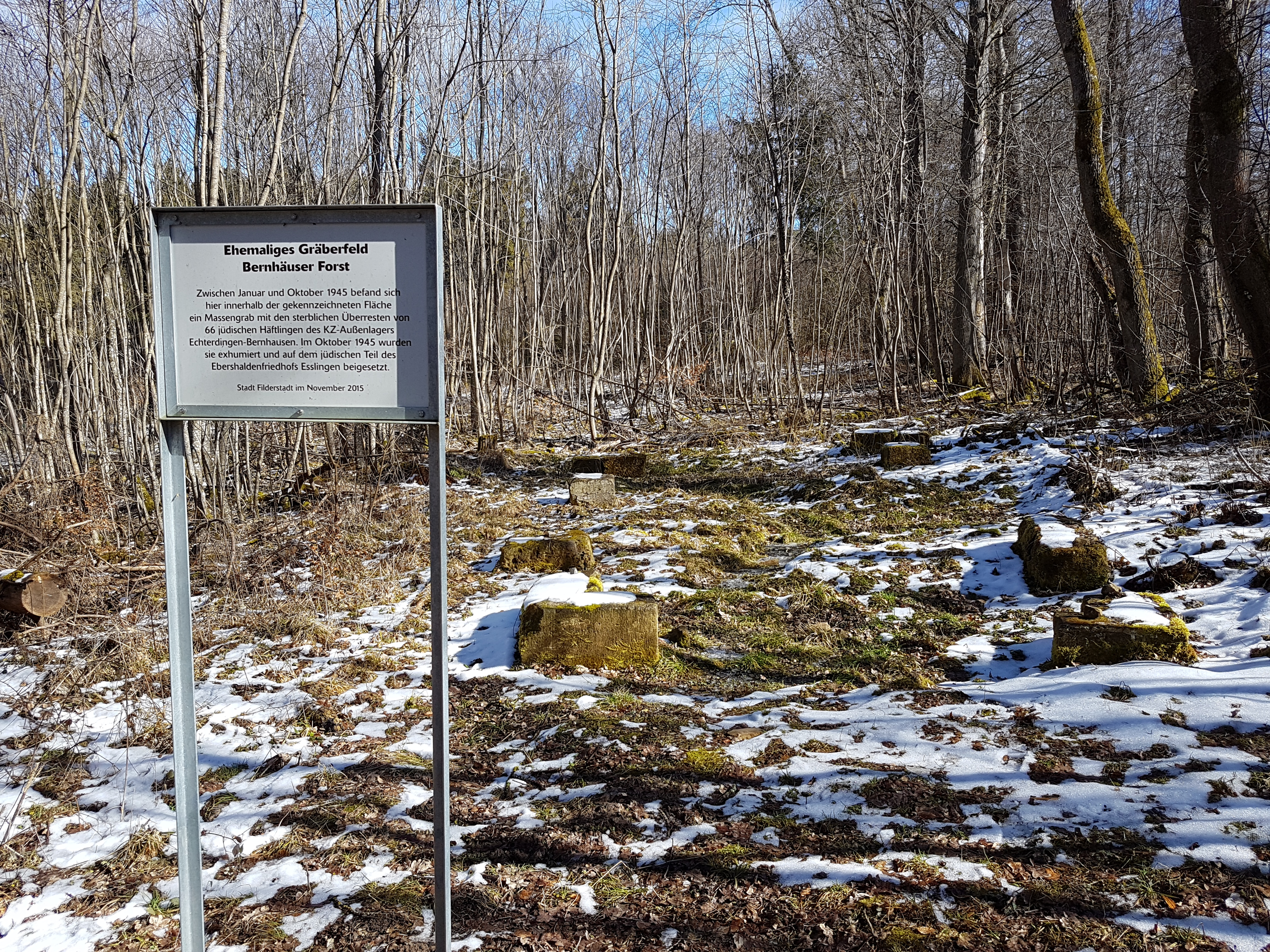 Das ehemalige Massengrab in östlicher Blickrichtung